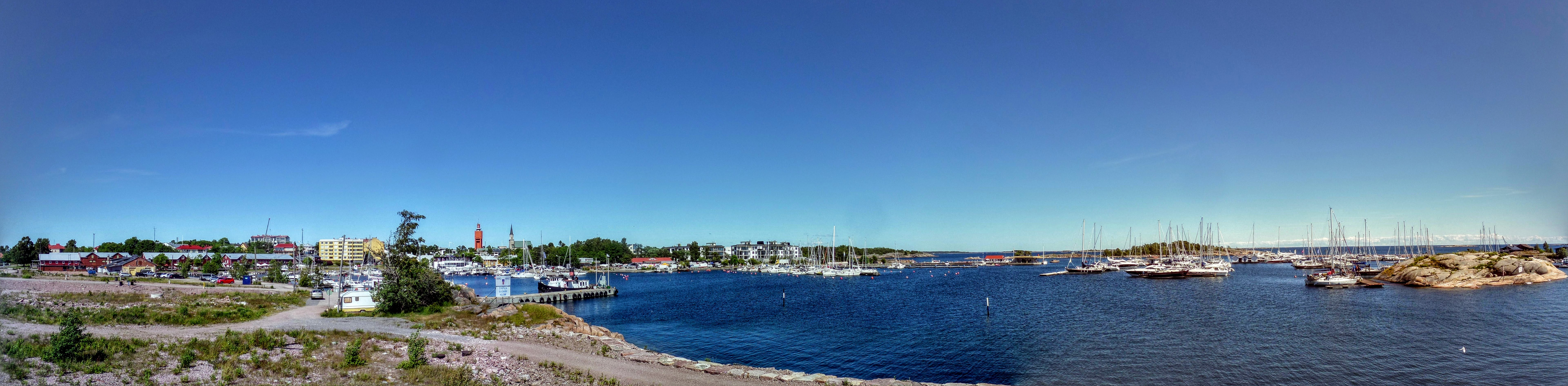 Hangon Itäsatama; satama Hangossa